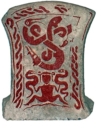 En av Gotlands mange runesteiner, som muligens gjenforteller Hvitstjernes tre slanger.